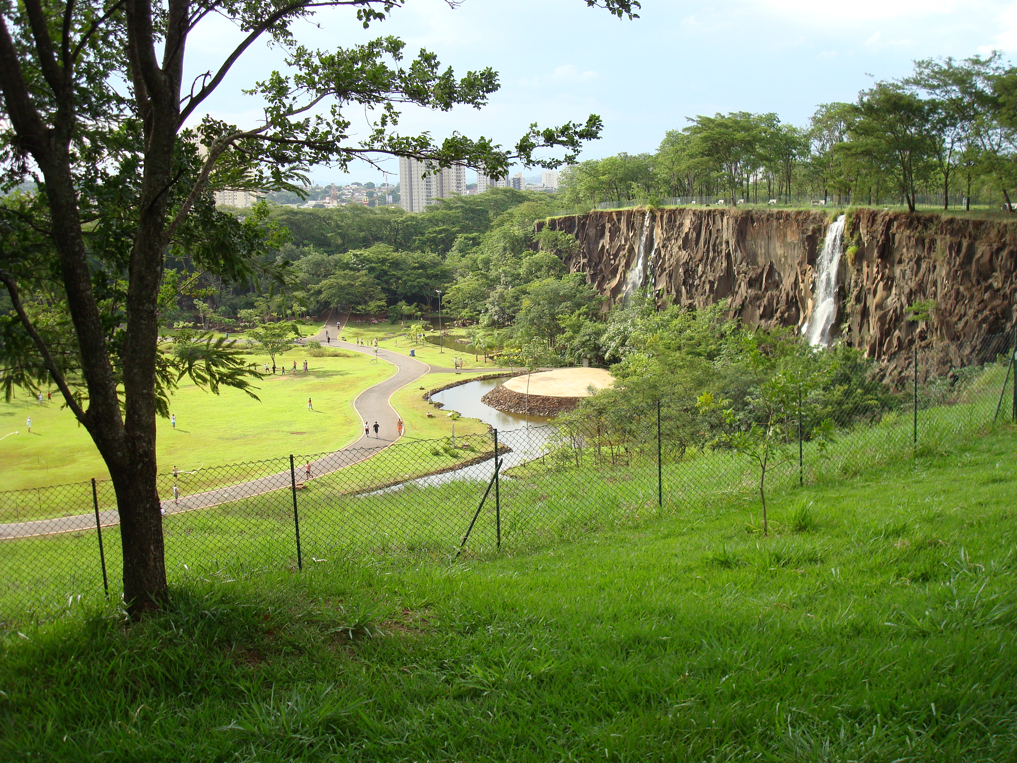 Vista superior do parque "Curupira"